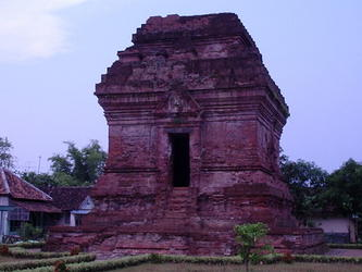 Pari temple, Sidoarjo, East Java, Indonesia